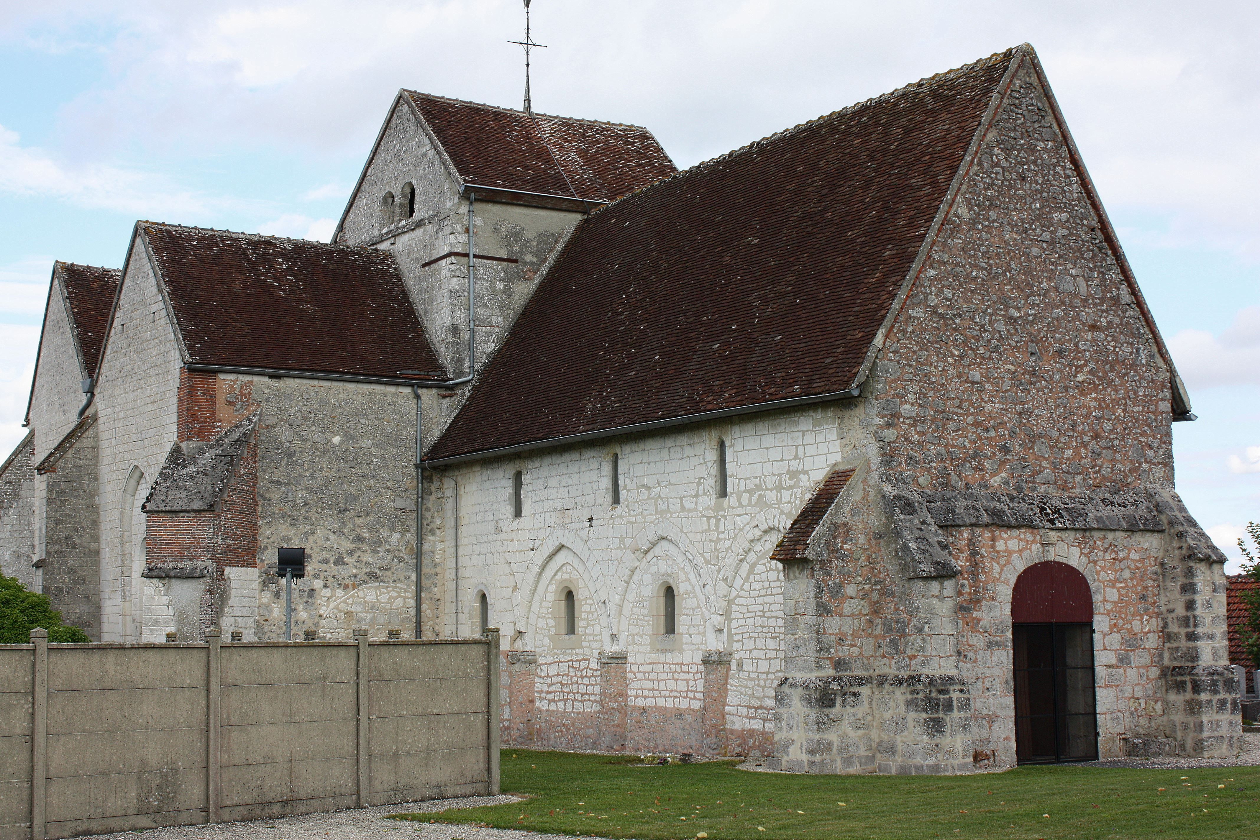 Connantray - Eglise Saint-Hilaire L'église vue du Nord-Ouest